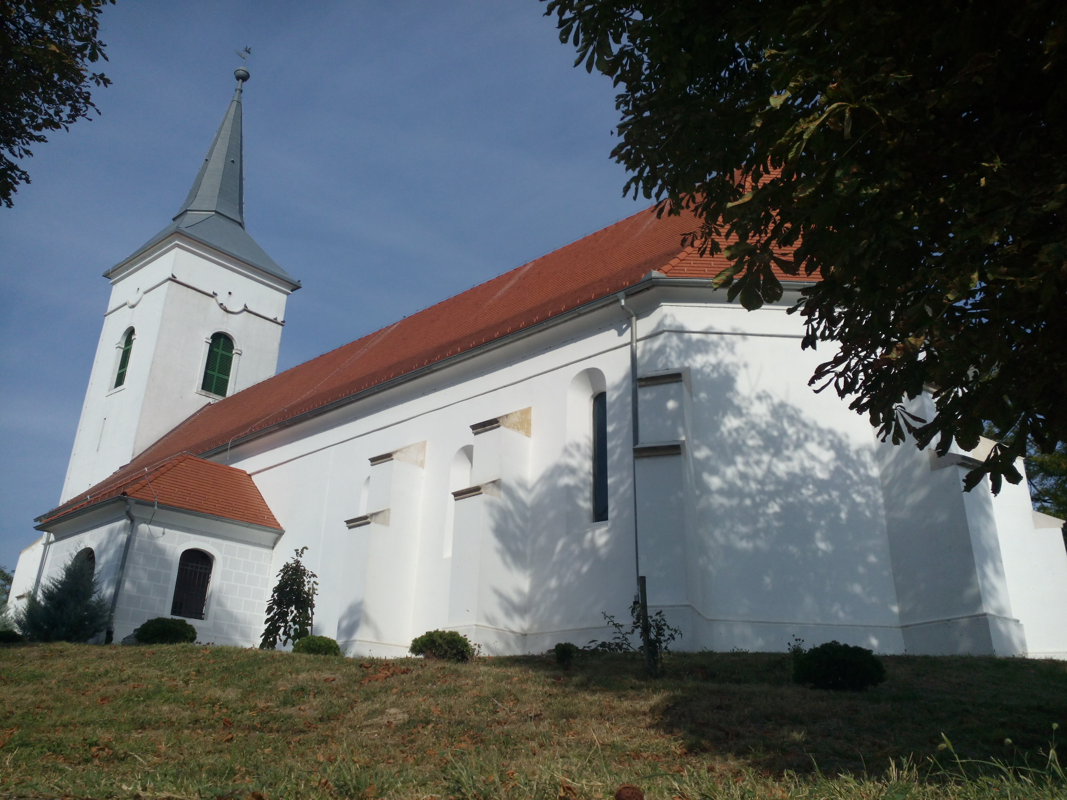 Protestantska, reformatska crkva u Kneževim Vinogradima.